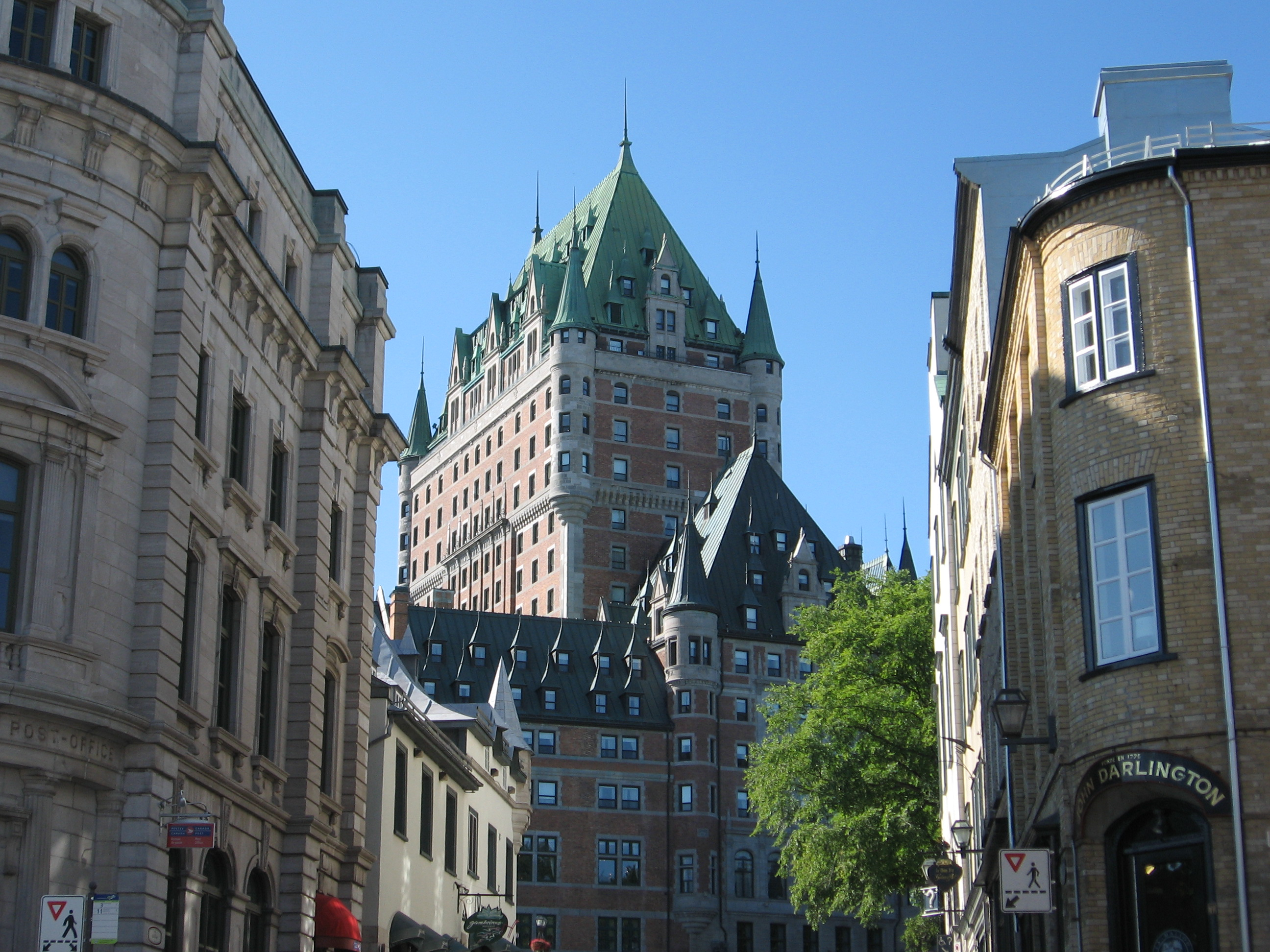 vue de la rue